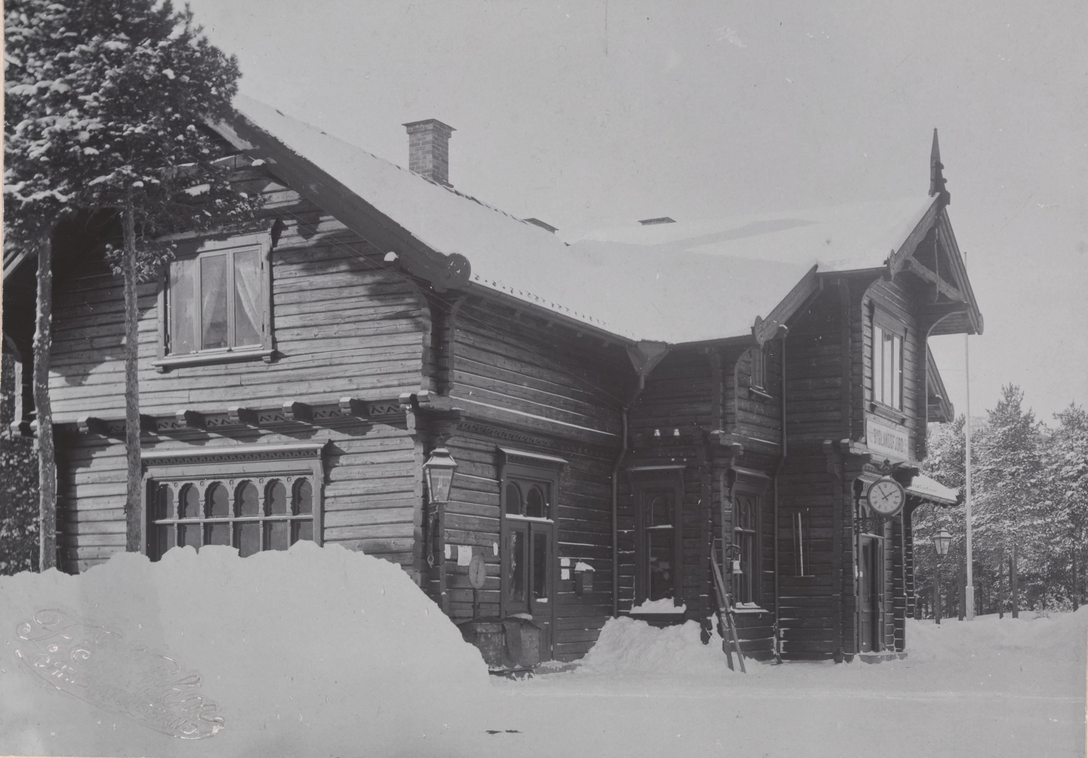 Bildet er hentet fra Nasjonalbibliotekets bildesamling. Anmerkninger til bildet var: Tittel hentet fra påskrift på komponentnr 1